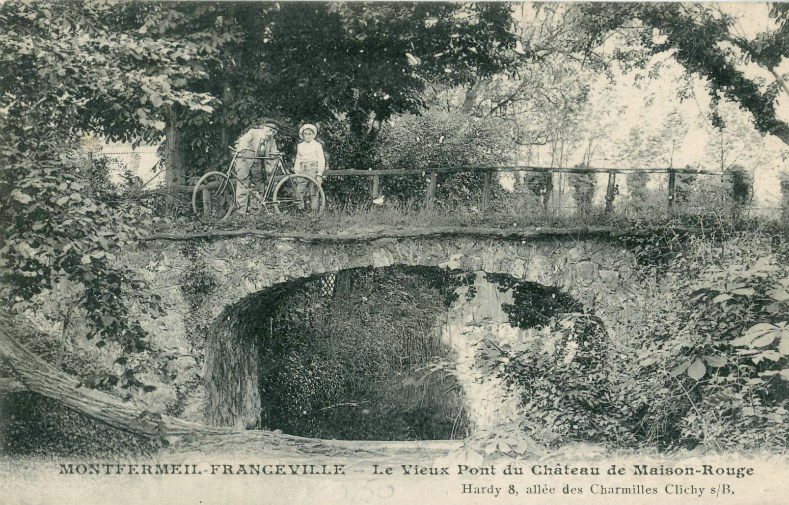 Carte postale ancienne éditée par Hardy, 8, allée des Charmilles, Clichy-sous-Bois :MONTFERMEIL-FRANCEVILLE - Le Vieux Pont du Château de Maison-Rouge